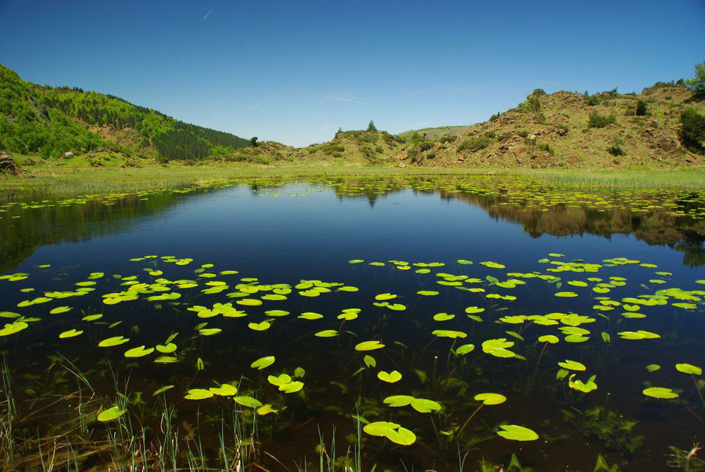 Petit étang posé sur une tourbière entre Col d'Agnes et étang de Lers.